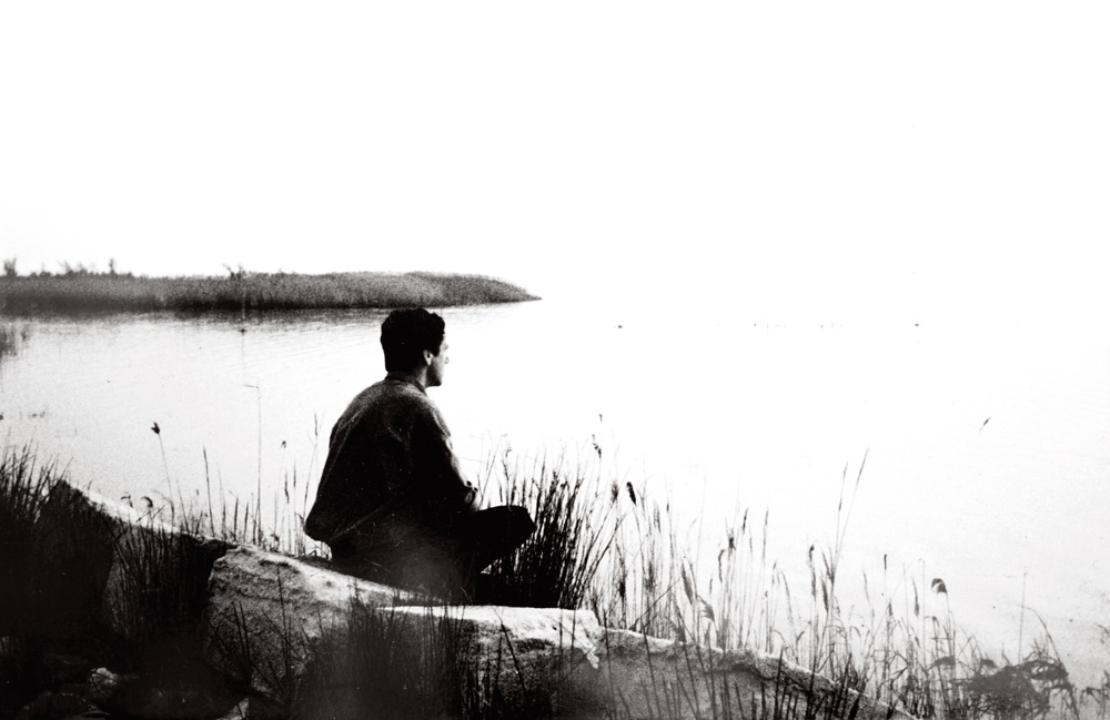 Marie-Claude White — Portrait de Kenneth White en Camargue, Revue Lisières n° 27